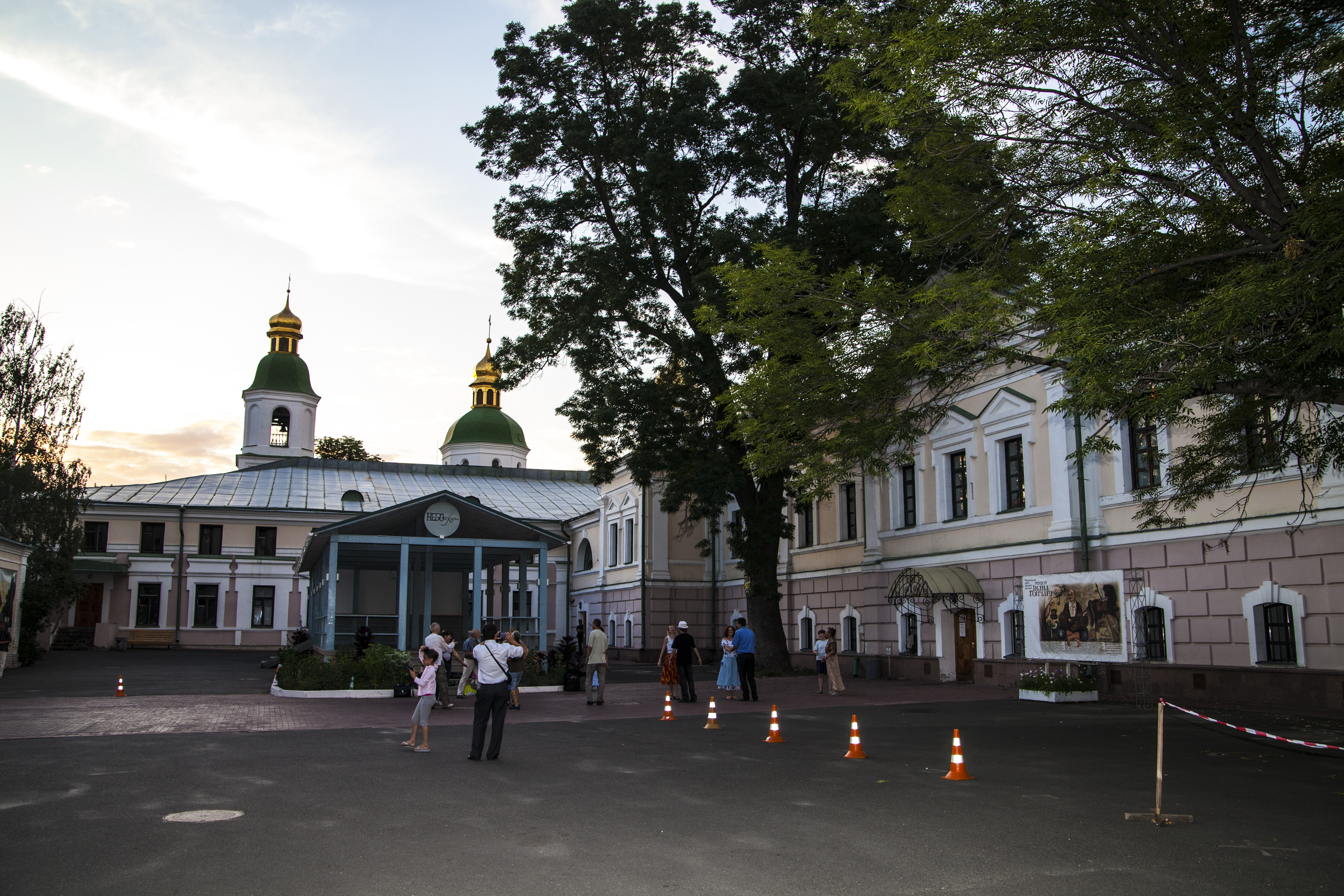 Ivan Honchar Museum & Lavrska Street.